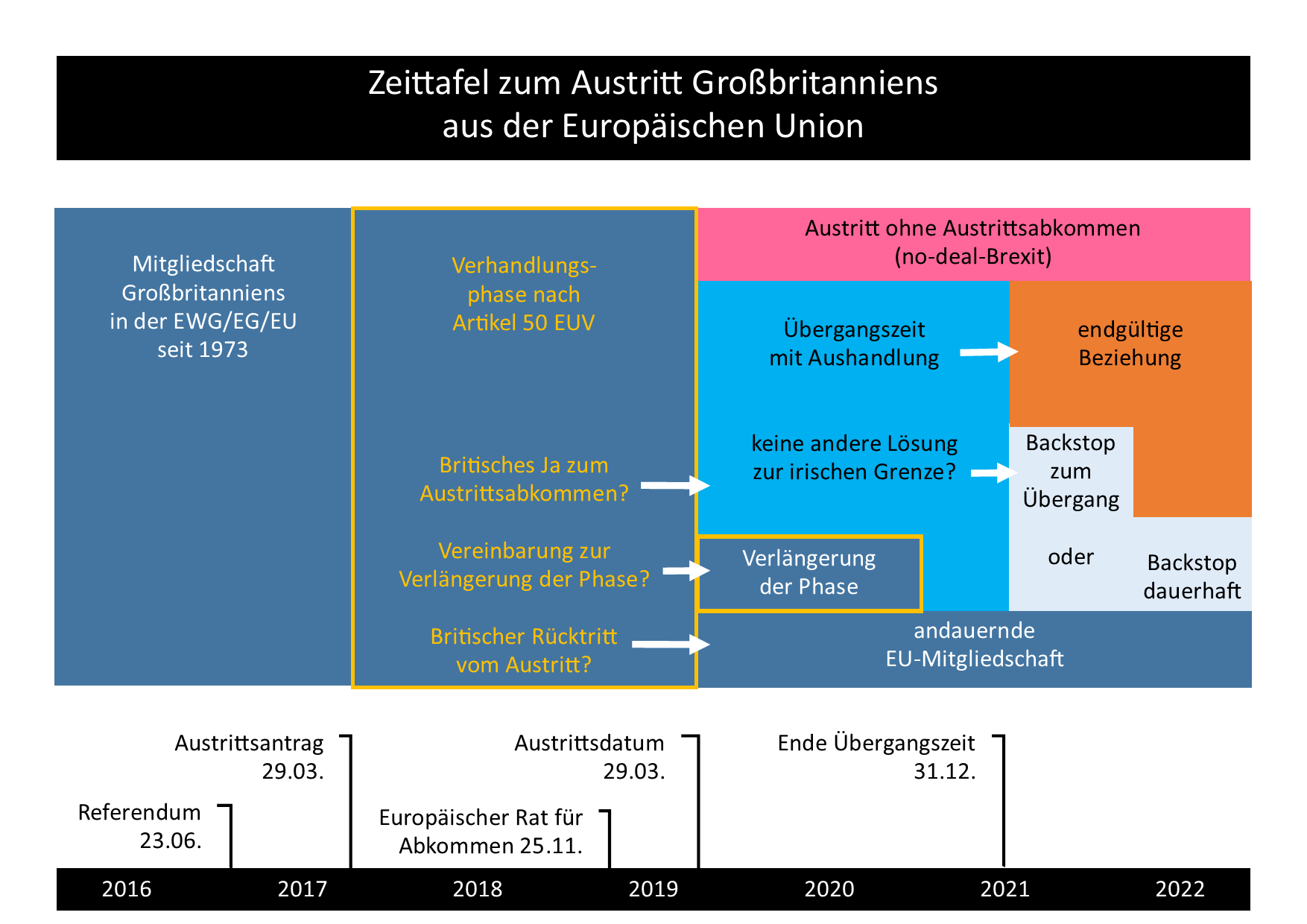 Zeittafel zum Austrittsprozess Großbritanniens aus der Europäischen Union